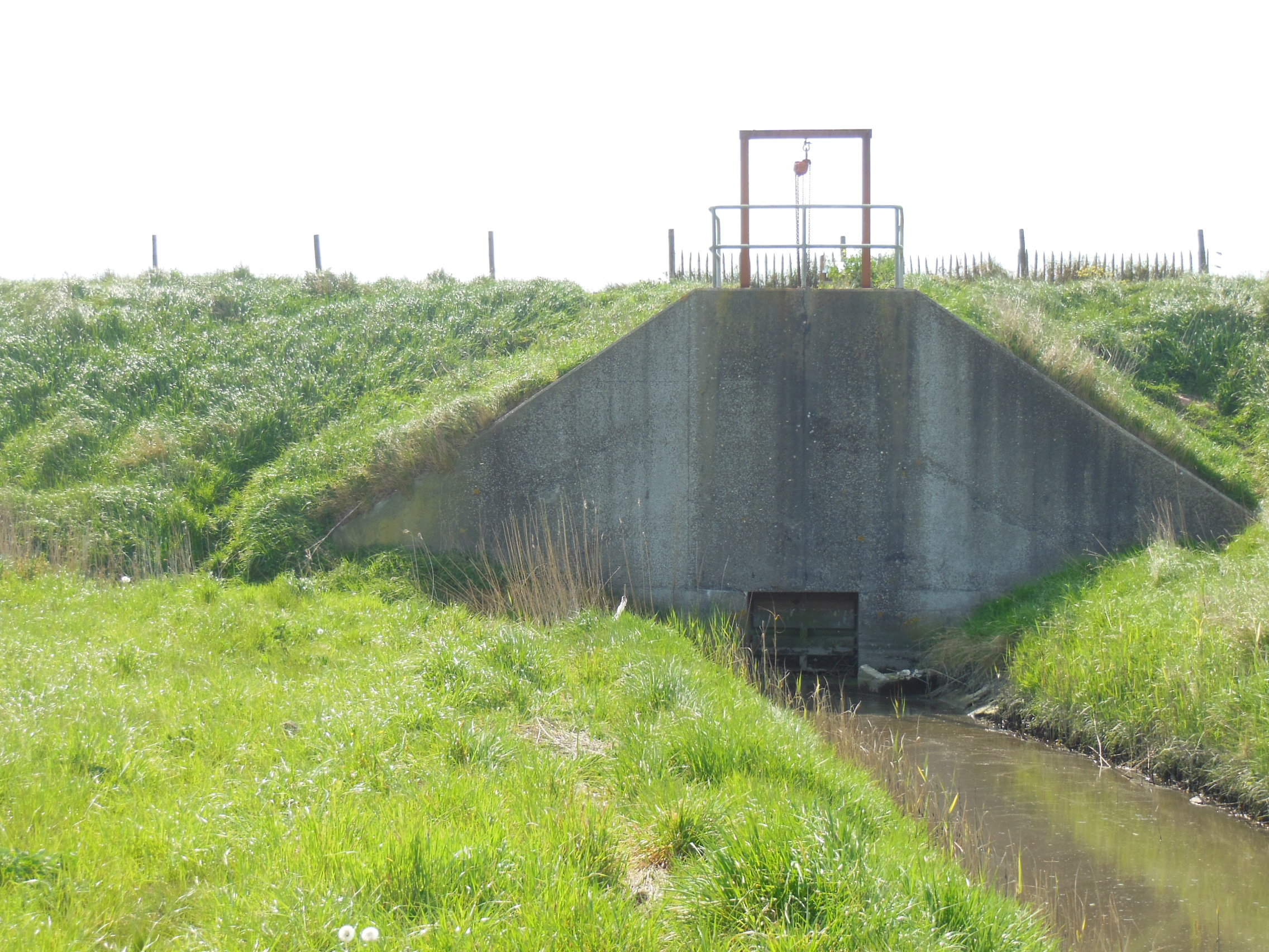 Het Pietesas ingebouwd in de dijk; onderaan het hefschot voor de opening. Bovenop een galg met een katrol en ketting verbonden met het hefschot vier meter lager. Op de voorgrond Het Geleed.